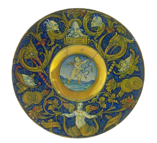 Piatto di Maestro Giorgio Andreoli. Gubbio 1525 c.